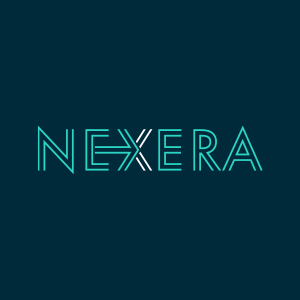 Logo NEXERA